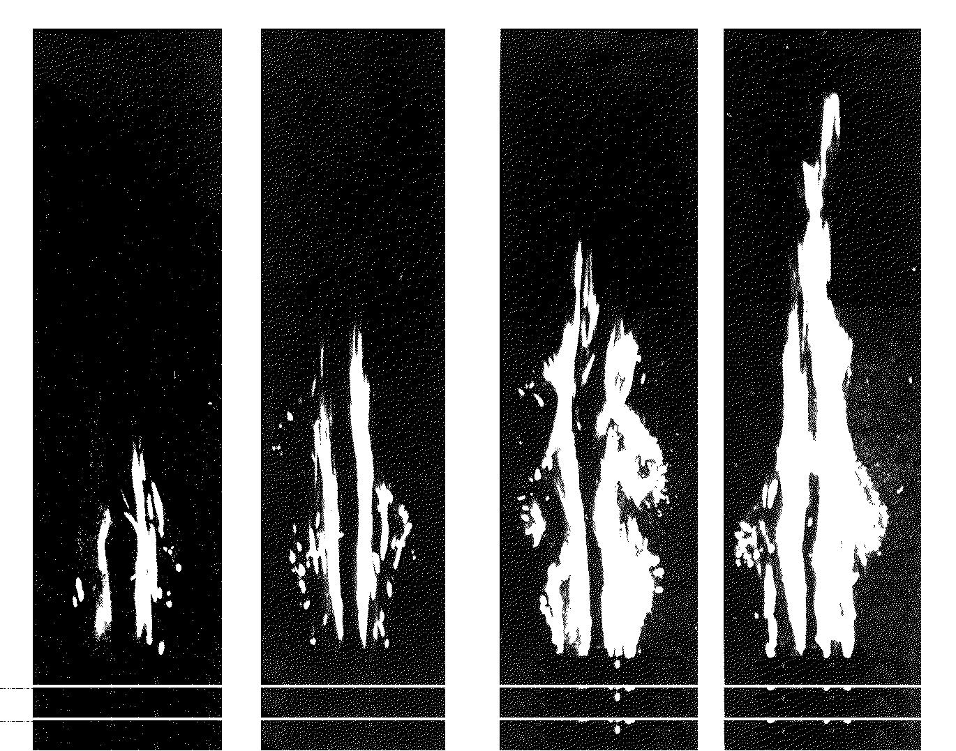 Фото факелів